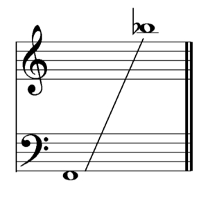 Freddie Mercurys Stimmumfang.